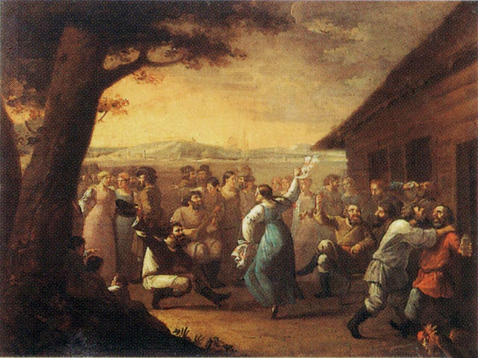 Сельский праздник. И. М. Танков (по каталогу 2012 года - неизвестный художник). 1790-е гг. (Гос. Рус. музей). Холст, масло. 76 х 101. Пост. в 1962 от Б. М. Федорова. Ж-7643 Народные праздники, а также связанные с ними обряды, обычаи и застолья вошли в отечественную живопись во второй половине XVIII века, когда в ней происходило медленное становление бытового жанра. Немногочисленные работы, дошедшие до нашего времени, отражали самые различные влияния — от реализма «малых голландцев», не чуждого откровенной брутальности, до классицизма с его программной идеализацией. Вместе с тем эти первые опыты, робкие, но искренние, свидетельствовали о постепенном пробуждении общественного интереса к народной жизни и ее наиболее типичным, ярким сторонам.